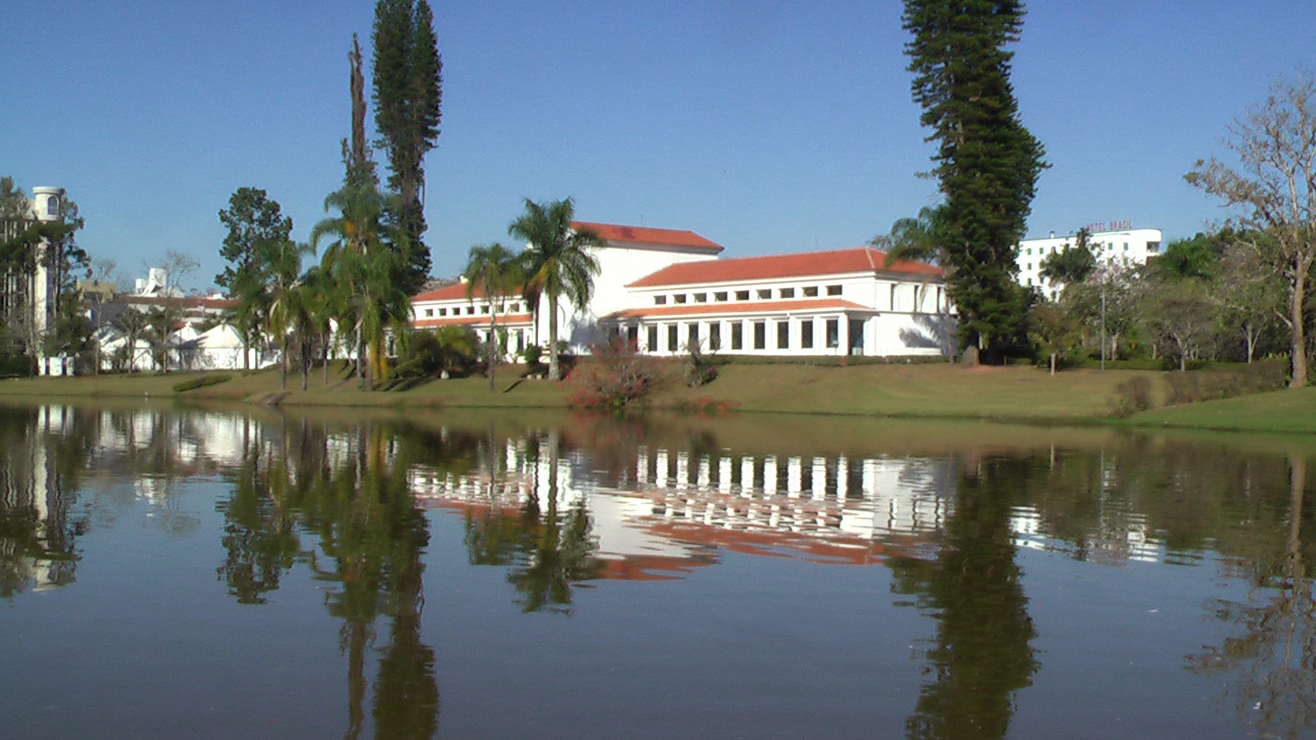 Foto do Balneário do Parque das Águas de São Lourenço